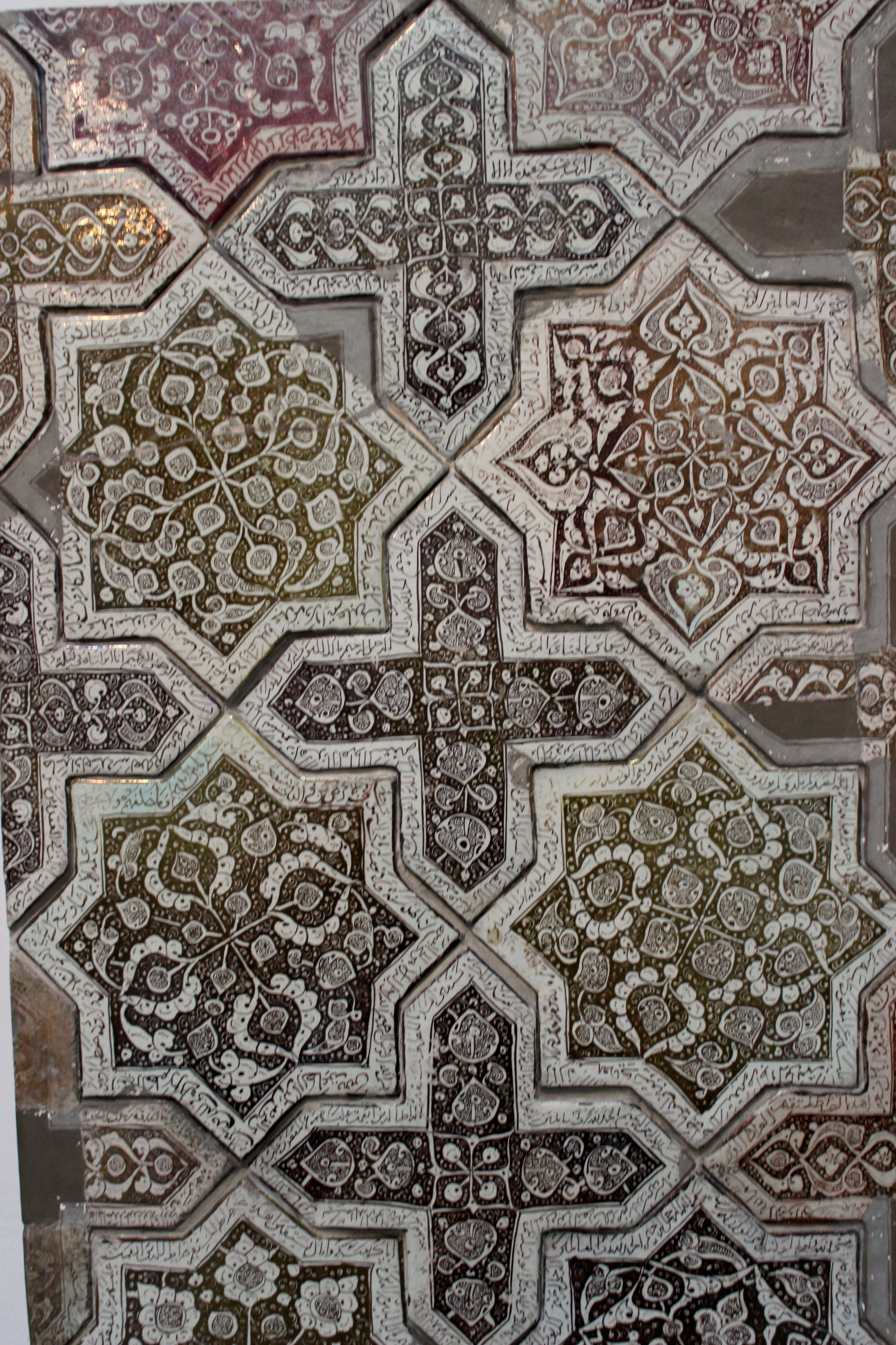 Berlín, Museo de arte islámico. Panel de cerámica de Kashan, s. XIII.